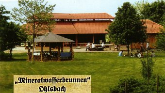 BrunnenOhlsbach